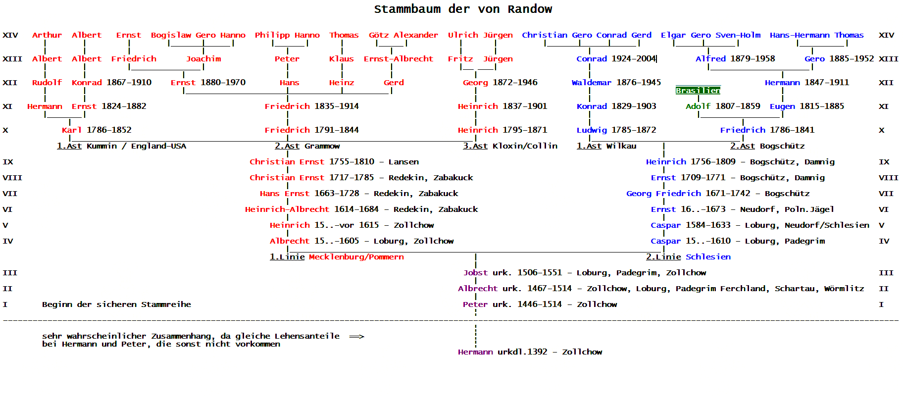 Stammbaum der Stammhalter der von Randow